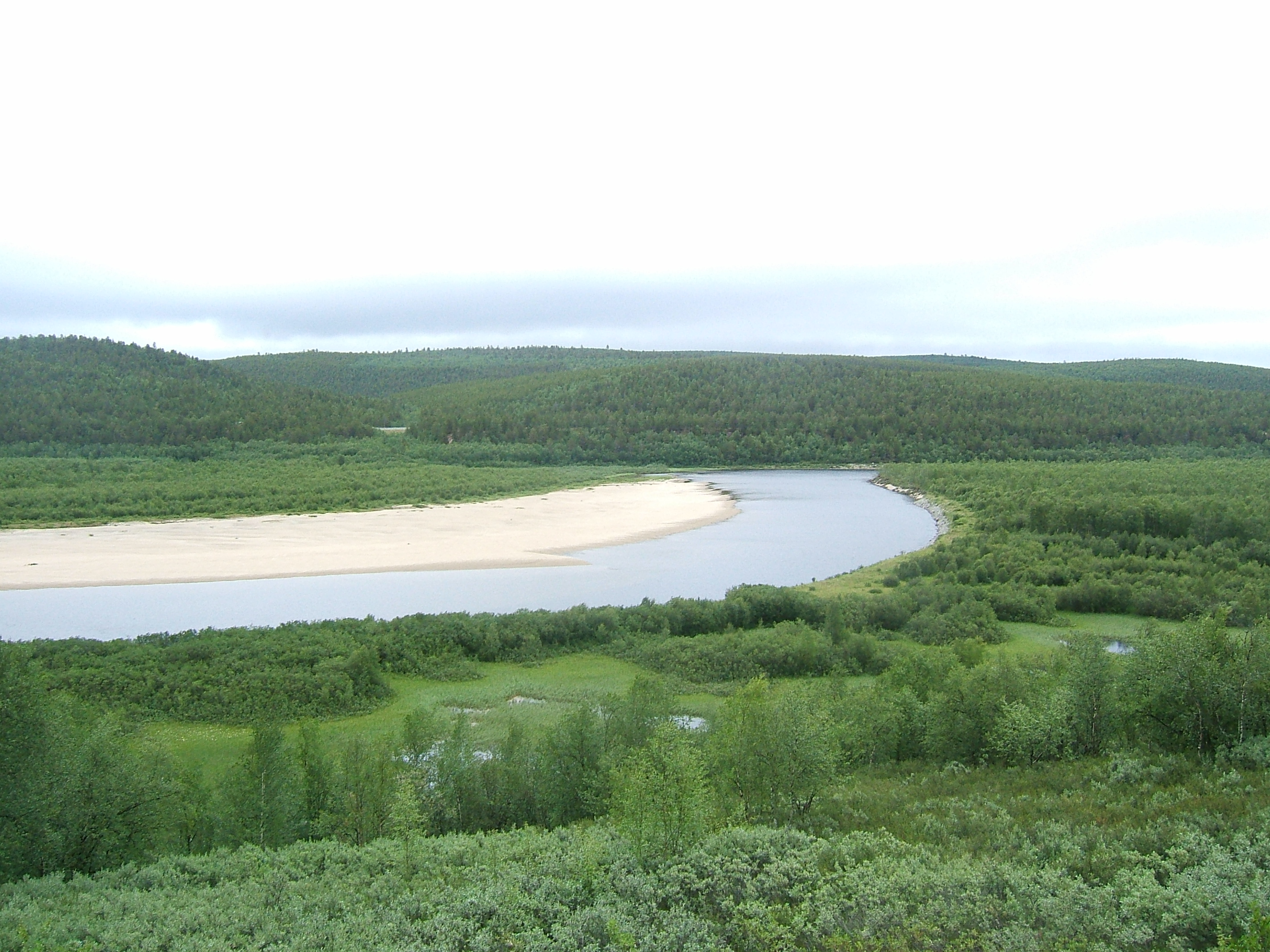 Kárášjokha river